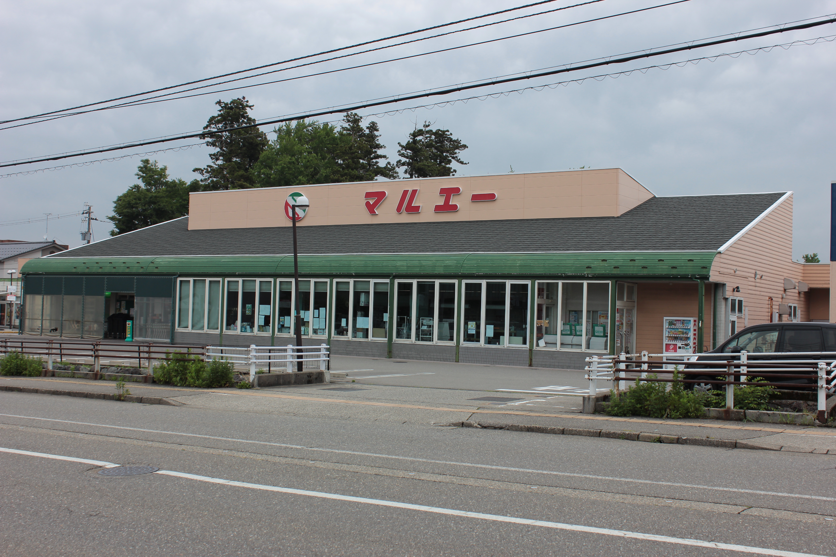 マルエー小立野店（石川県金沢市） Canon EOS Kiss X5